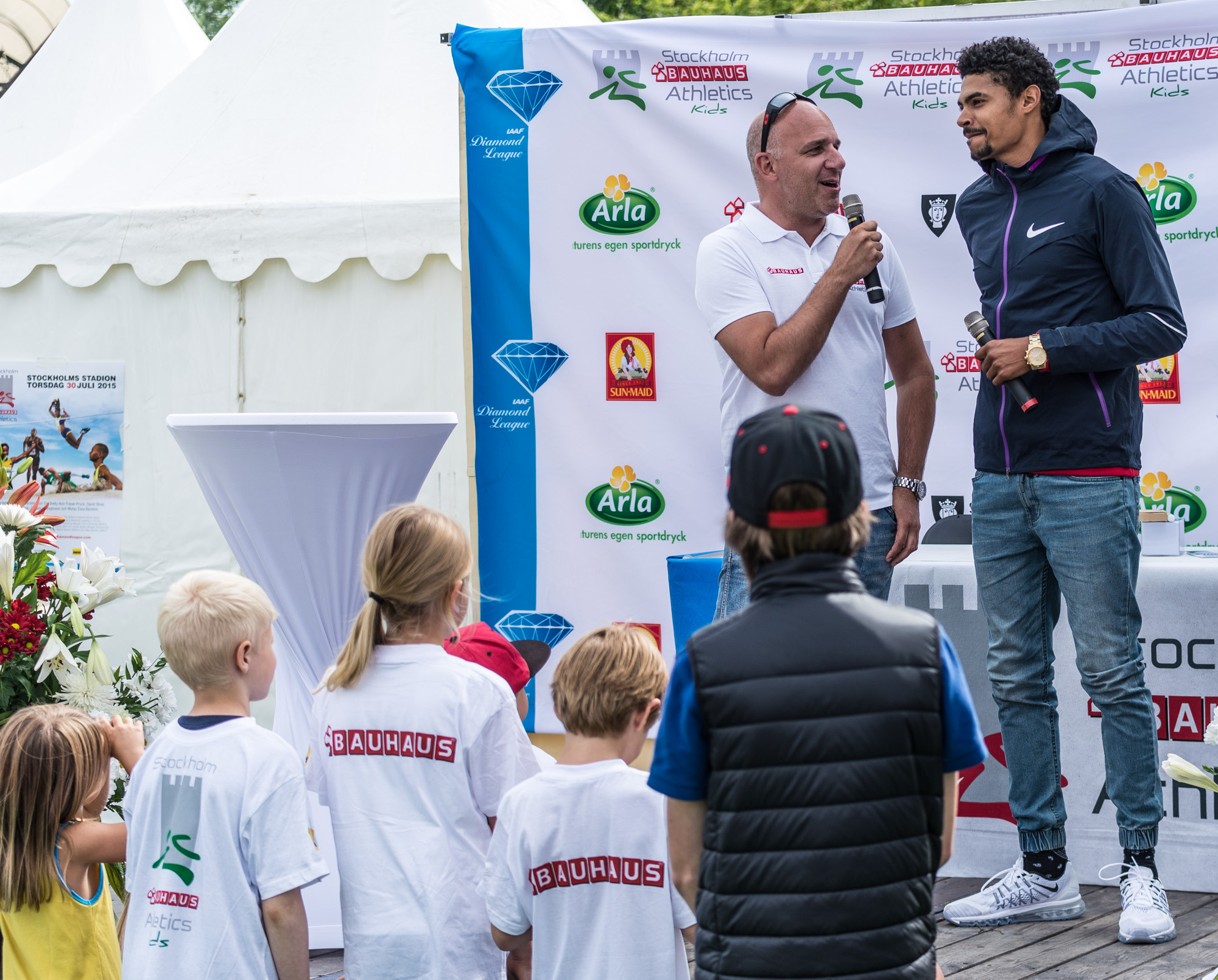 Michel Tornéus i Kungsträdgården i Stockholm i juli 2015 under Bauhaus Athletics Kids dag och inför IAAF Diamond League-/Bauhaus-Galan på Stadion.